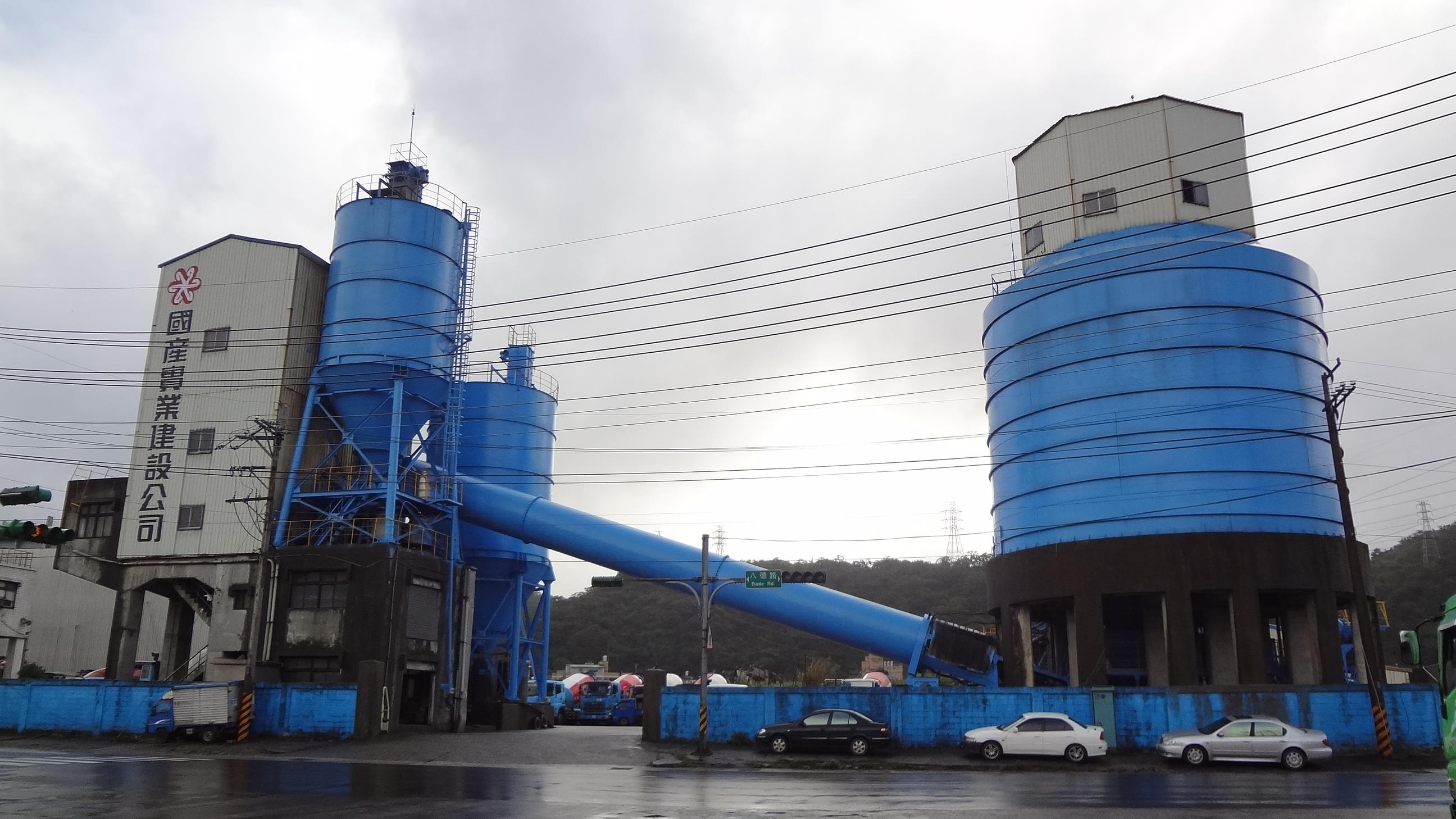 國產實業建設基隆廠，位於基隆市七堵區八德路2之1號。